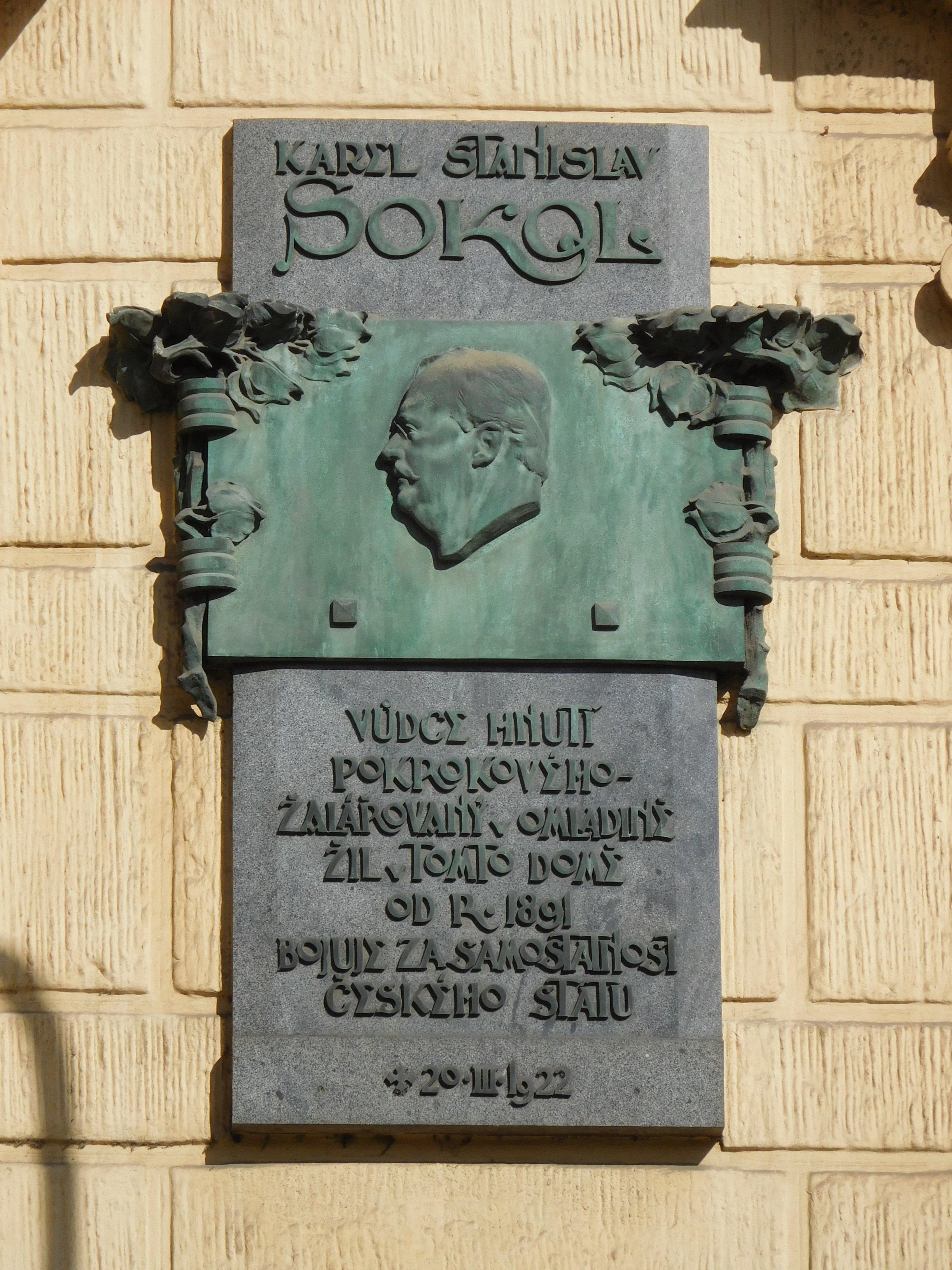 Praha - Nové Město, Opletalova 21, pamětní deska Karla Stanislava Sokola